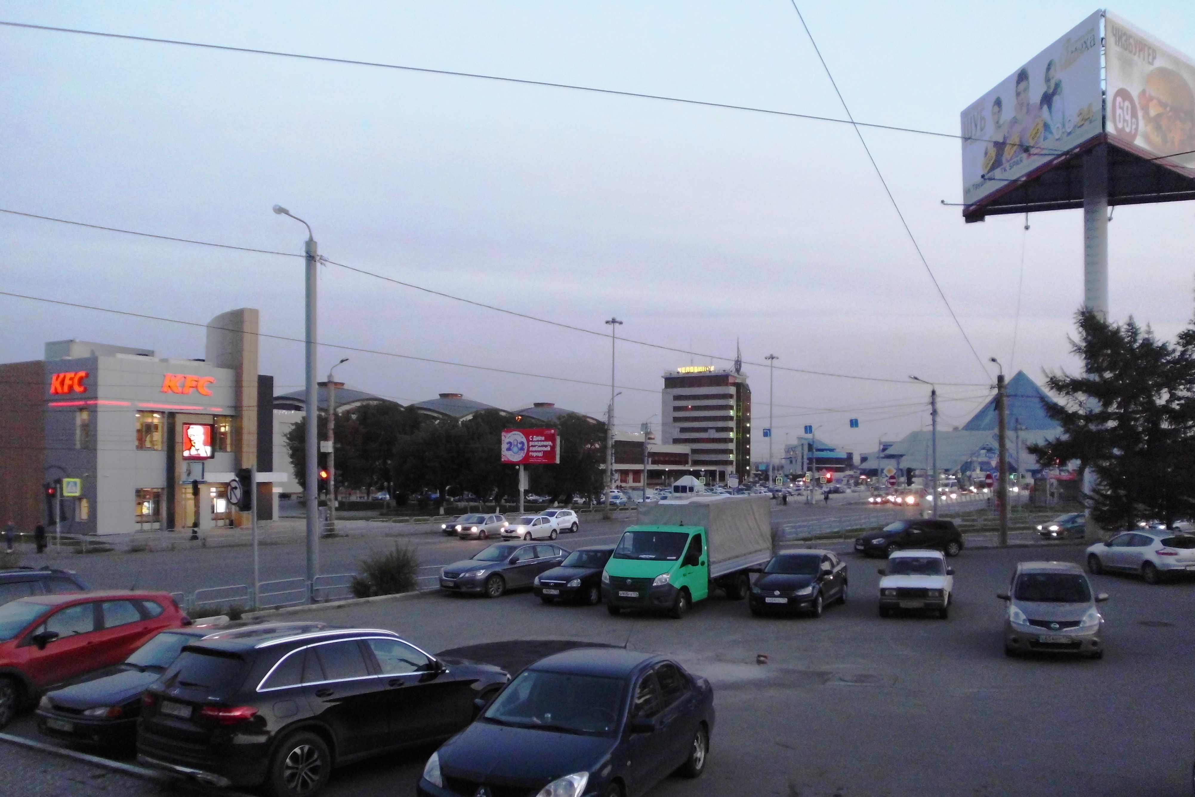 Здание железнодорожного вокзала: площадь Привокзальная, 1, Челябинск, Челябинская область. Гостиница вокзала (в правой части здания), привокзальная площадь, служебное здание станции (на дальнем плане) ТК "Синегорье" (справа), окончание проезжей части улицы Свободы, проезд на улицу с улицы Степана Разина. Вид от здания ул. Свободы, 110Б.